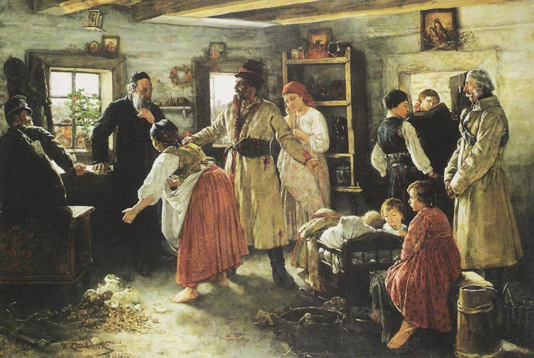 Kacper Żelechowski, "Wywłaszczenie", olej na płótnie, Lwowska Galeria Sztuki